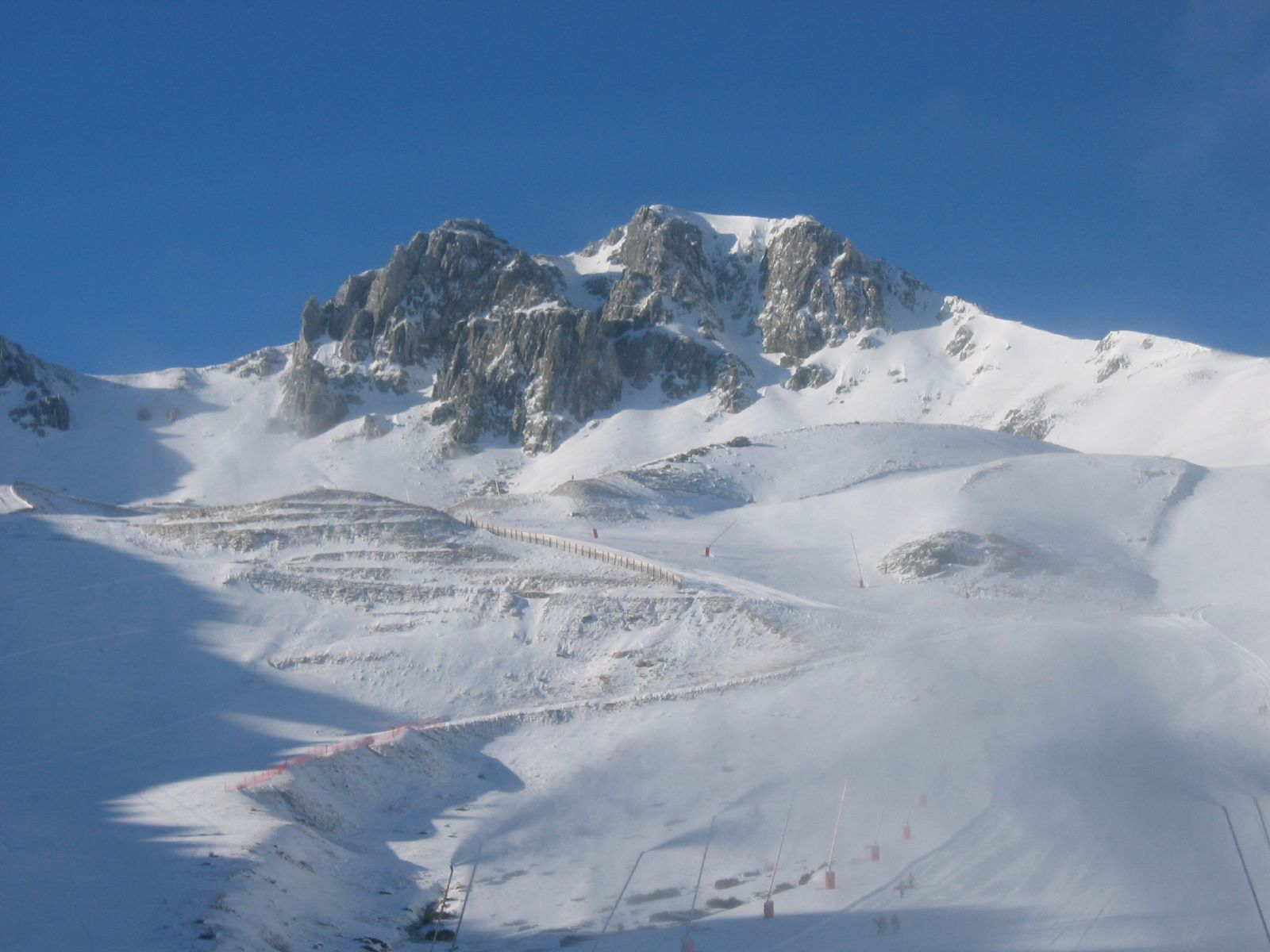 Foto de Flickr. Circo de Cebolledo.